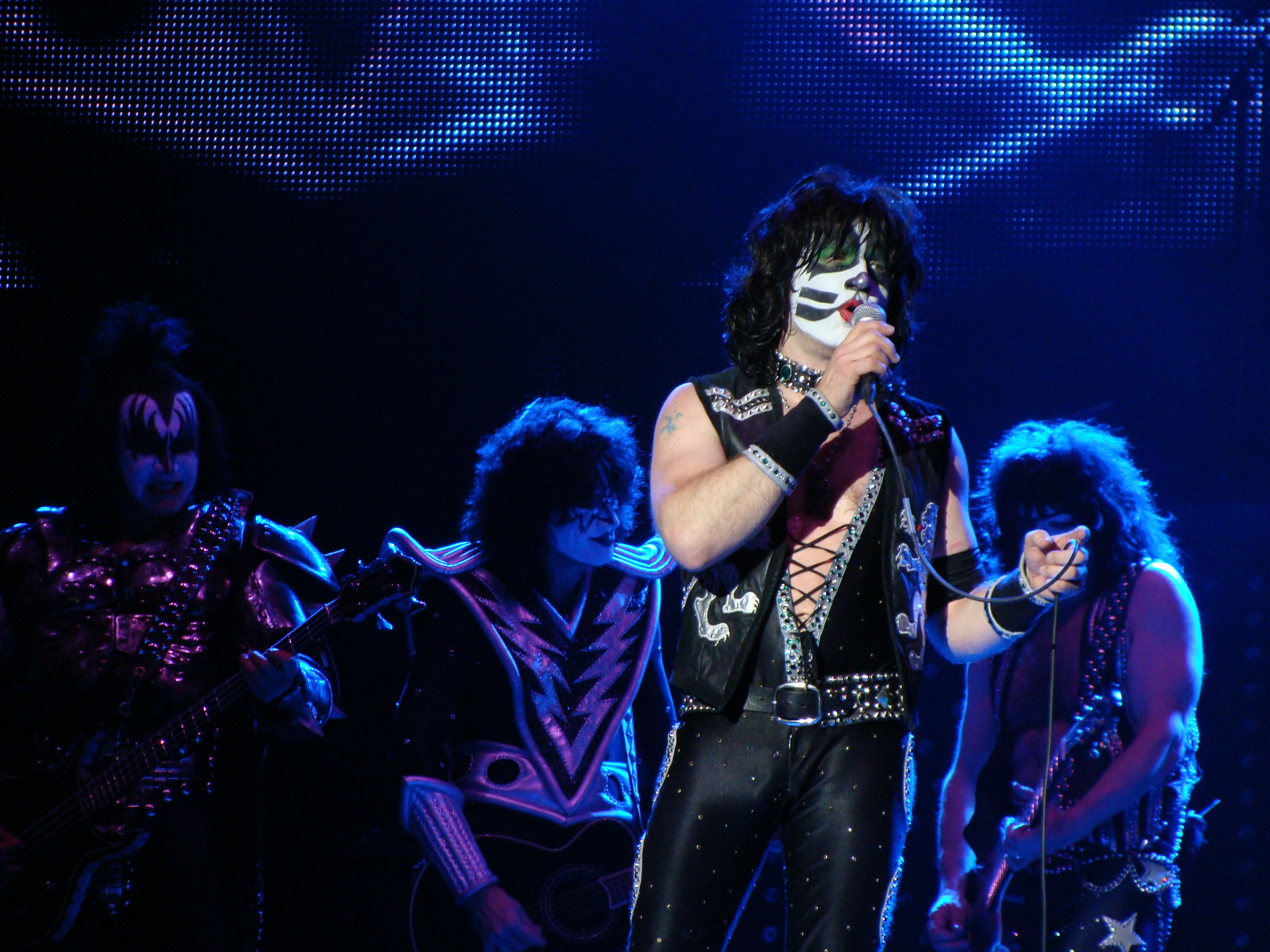 Eric Singer, en una actuación del grupo KISS en Vitoria-Gasteiz, en el Azkena Rock Festival.